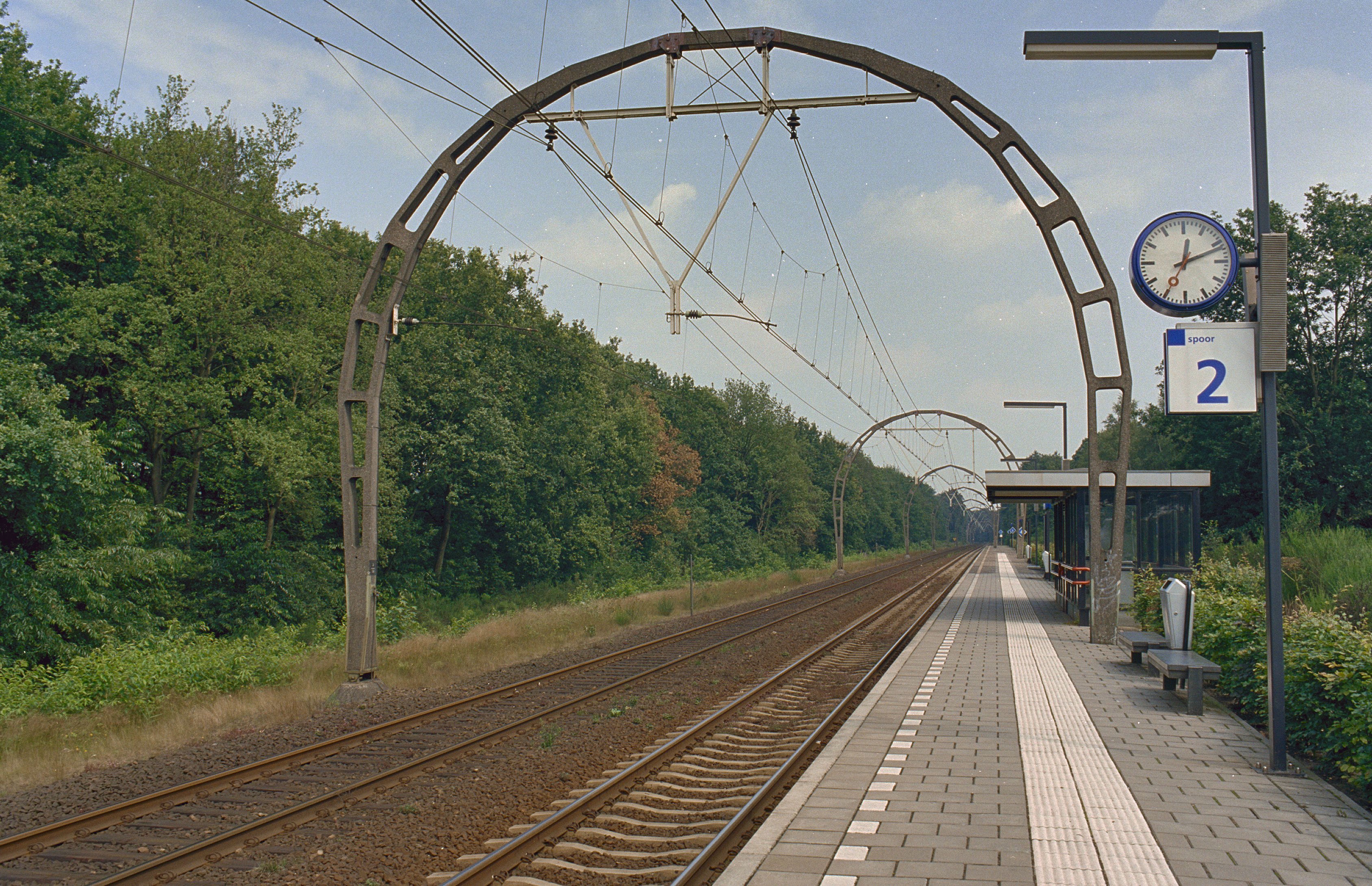 Station Hollandsche Rading, Spoorlijn Hilversum-Utrecht: Overzicht station met betonnen spoorbogen (opmerking: Gefotografeerd voor het Monumenten boek, Karel Loeff)